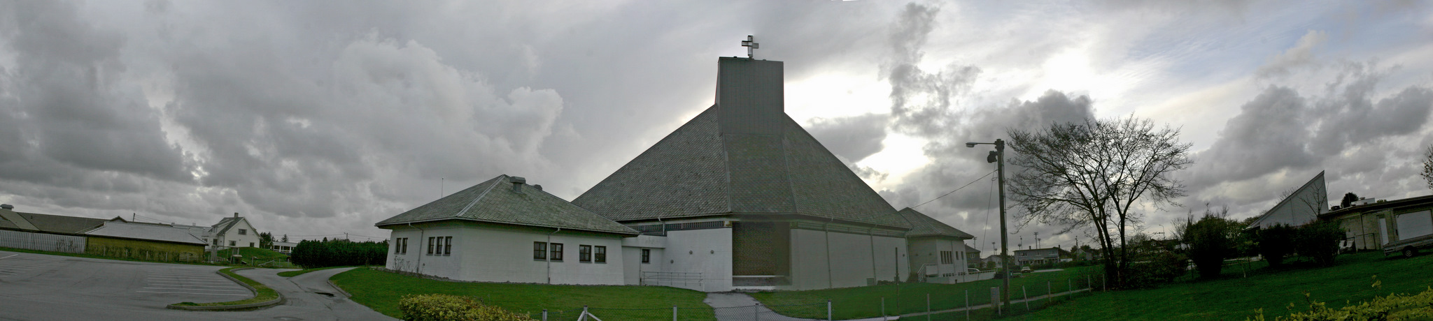 Åkra kirke